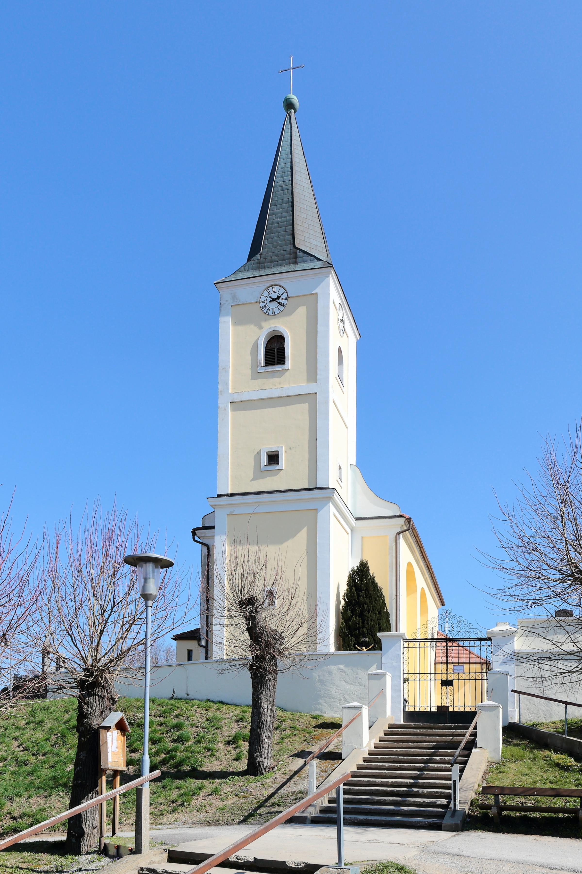 Westansicht der römisch-katholischen Pfarrkirche hl. Margaretha in Schrick, ein Ortsteil der niederösterreichischen Marktgemeinde Gaweinstal.Die Kirche mit eingezogener Rundapsis und einem vorgestellten Westturm wurde 1688/91 auf einem Hügel im Südosten des Ortes errichtet und ist von einem Friedhof umgeben.